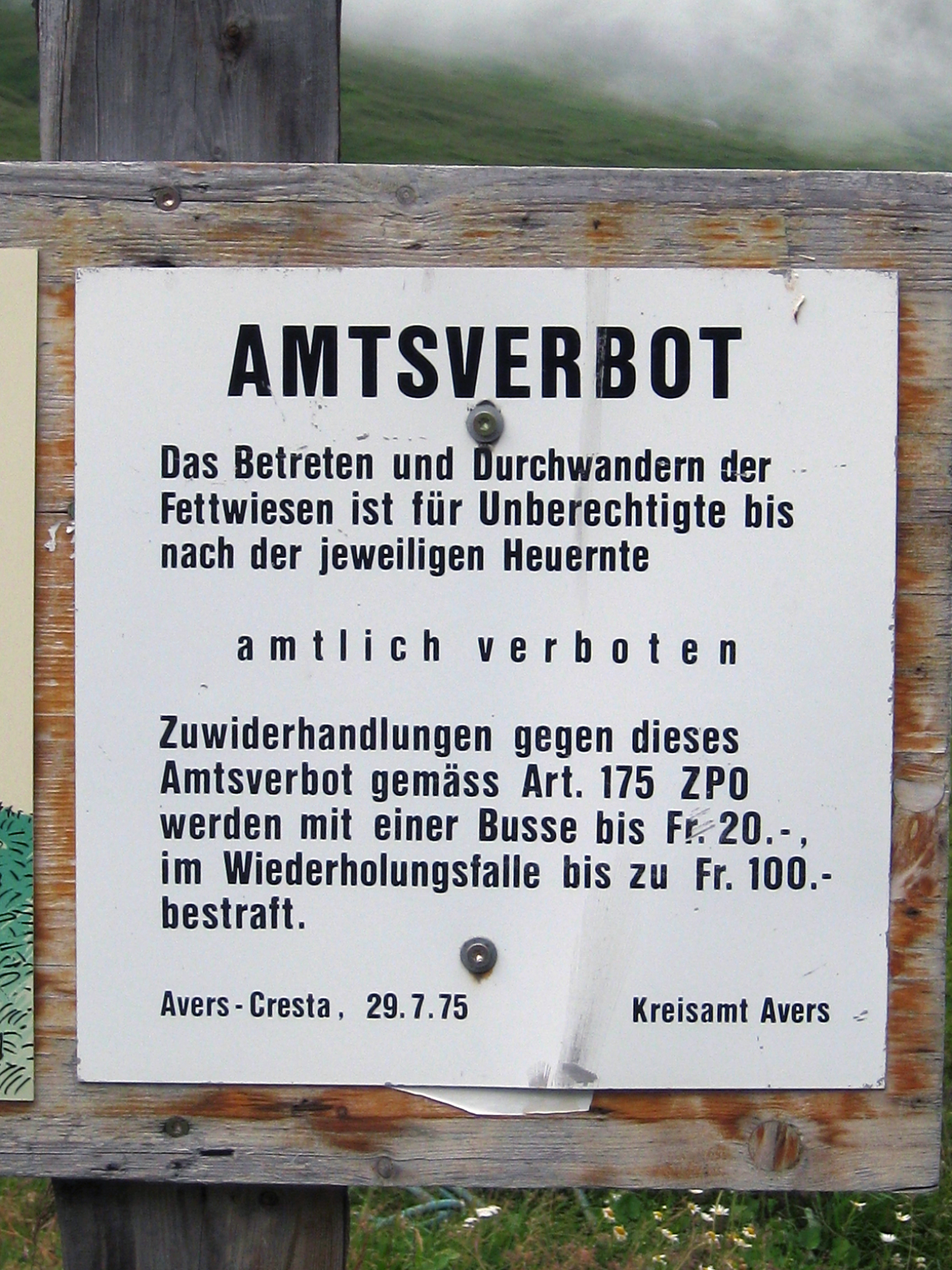 Juf, Schweiz